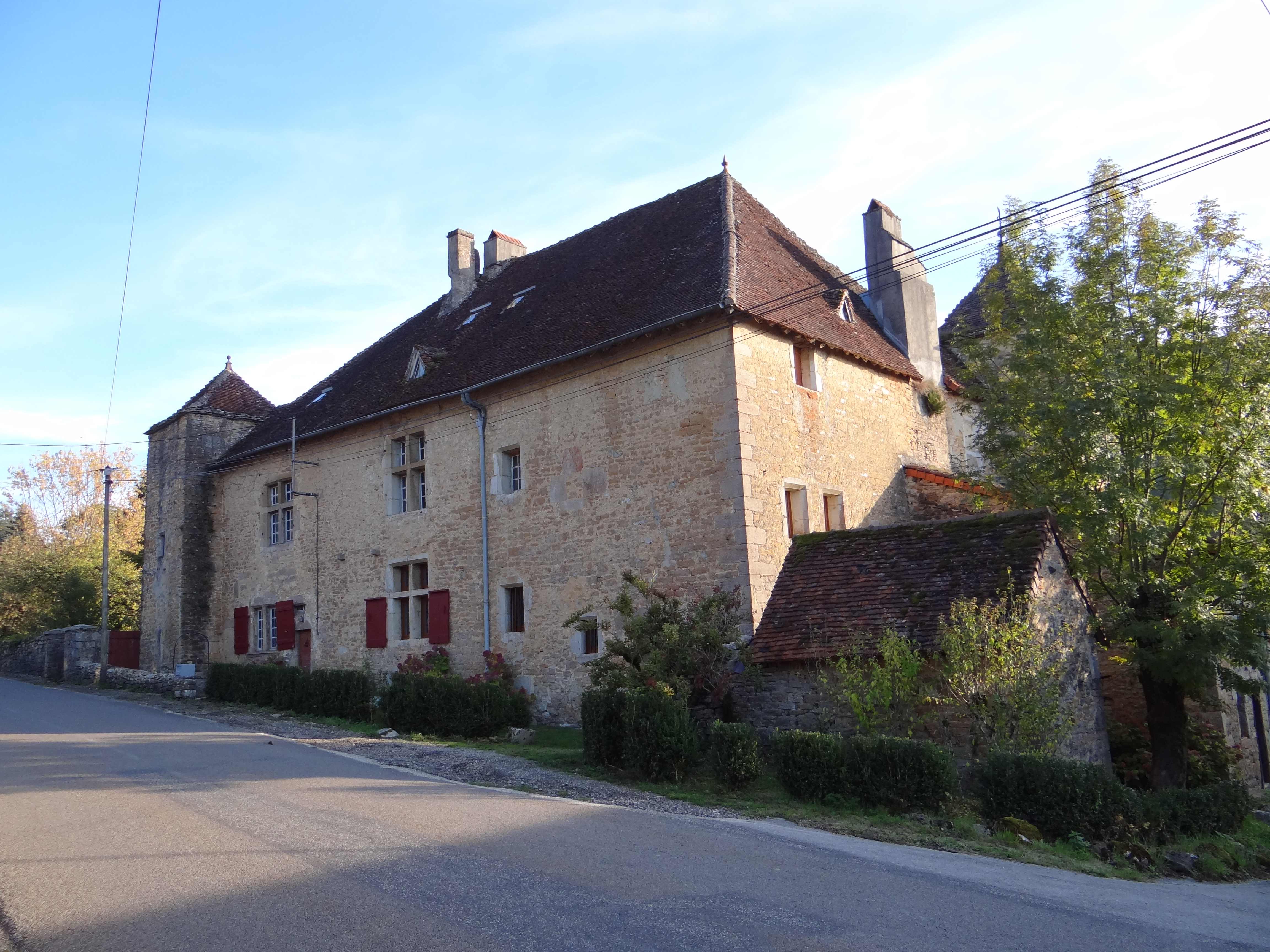 Massif corps de logis cantonné de deux tours de défense. Four banal au premier plan.